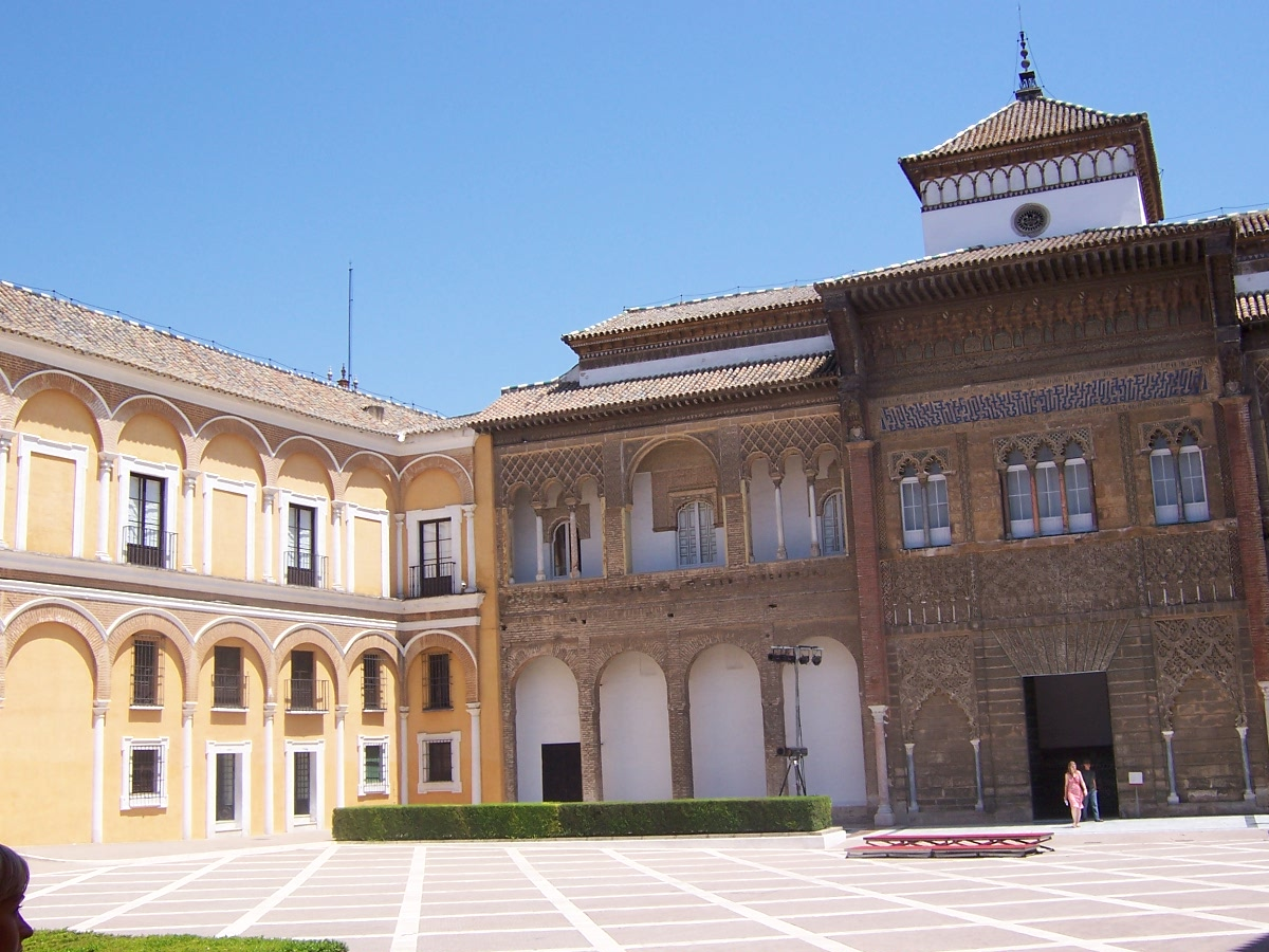 Alcázar de Sevilla camera: Kodak DX7440 Source: *Daniel Csorfoly